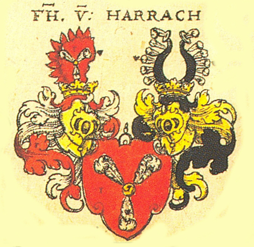 Wappen der Böhmischen und Österreichischen Adelsfamilie der Freiherren und Grafen von Harrach